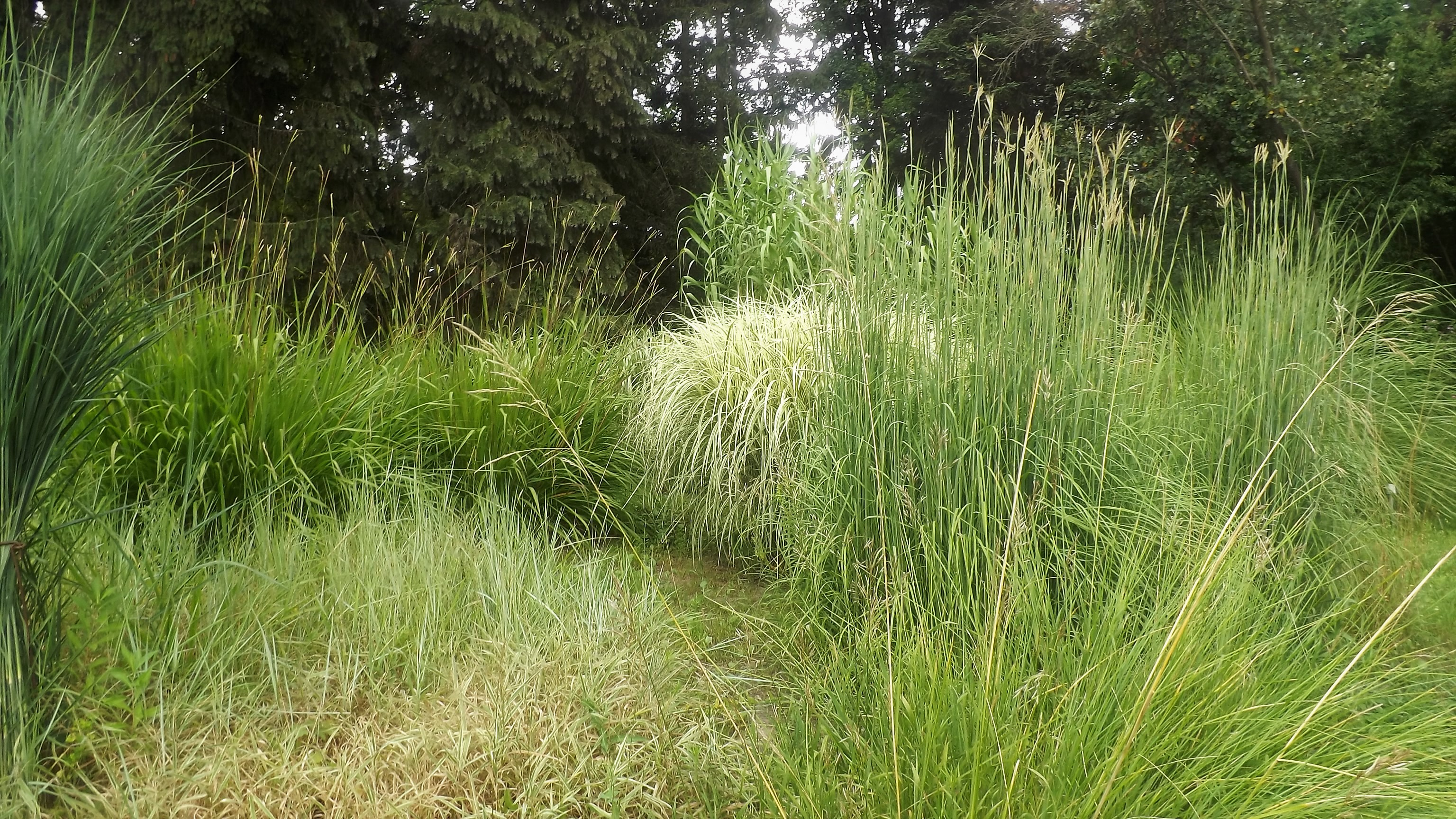 Vácrátóti botanikus kert